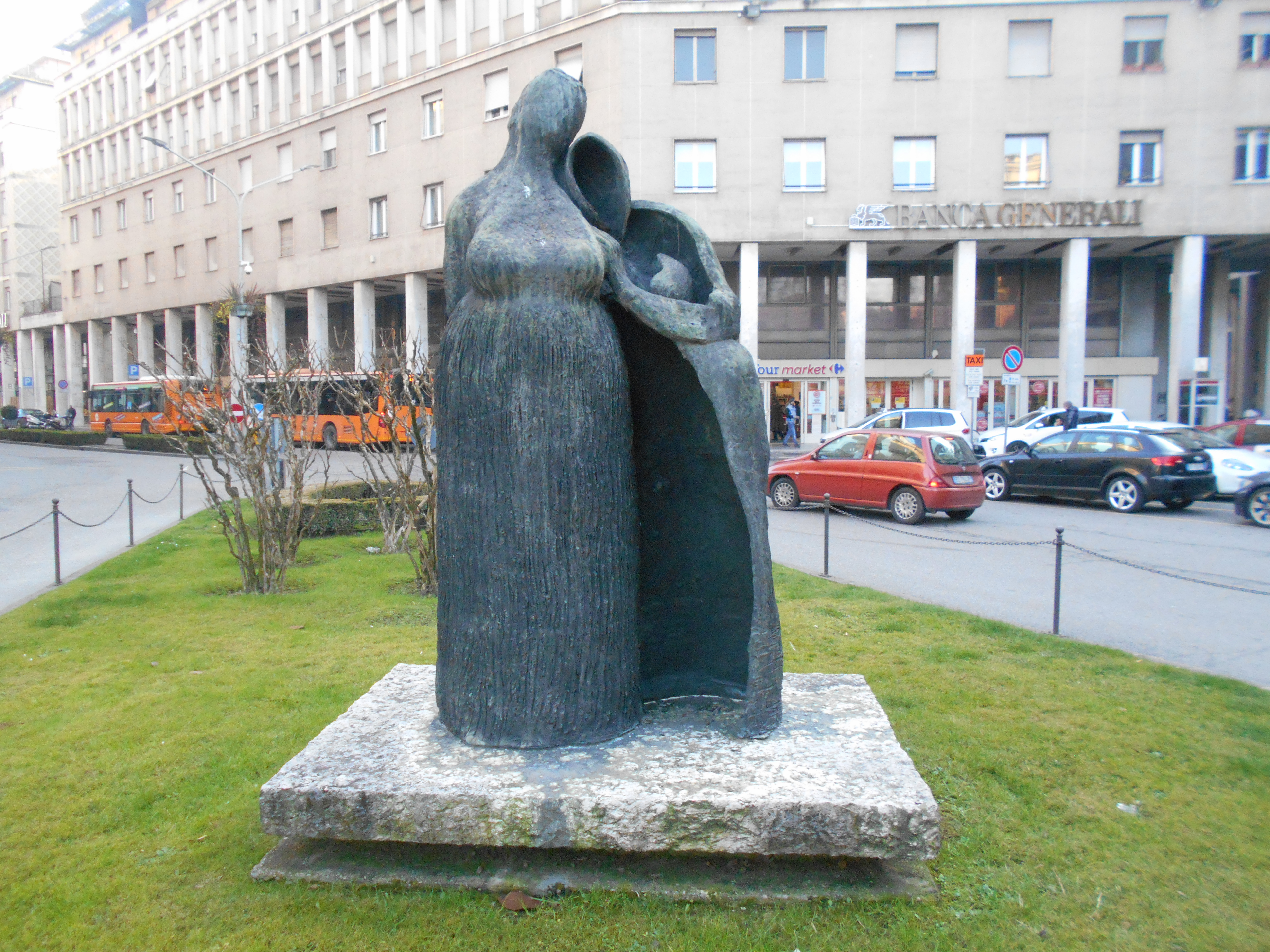 Monumento alla donna, Giuseppe Gorni, piazza Felice Cavallotti, Mantova